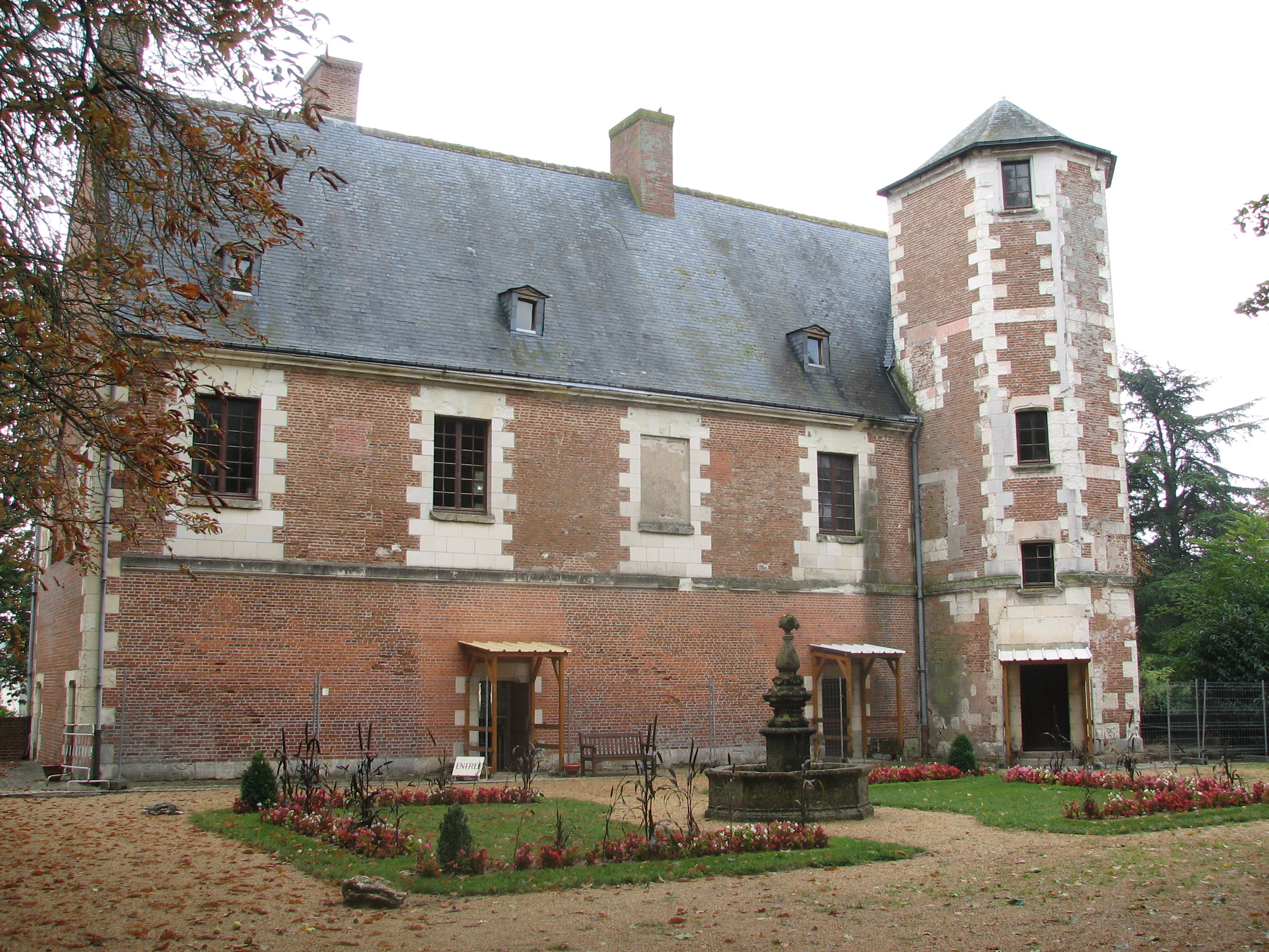 Château de Plessis-lès-tours